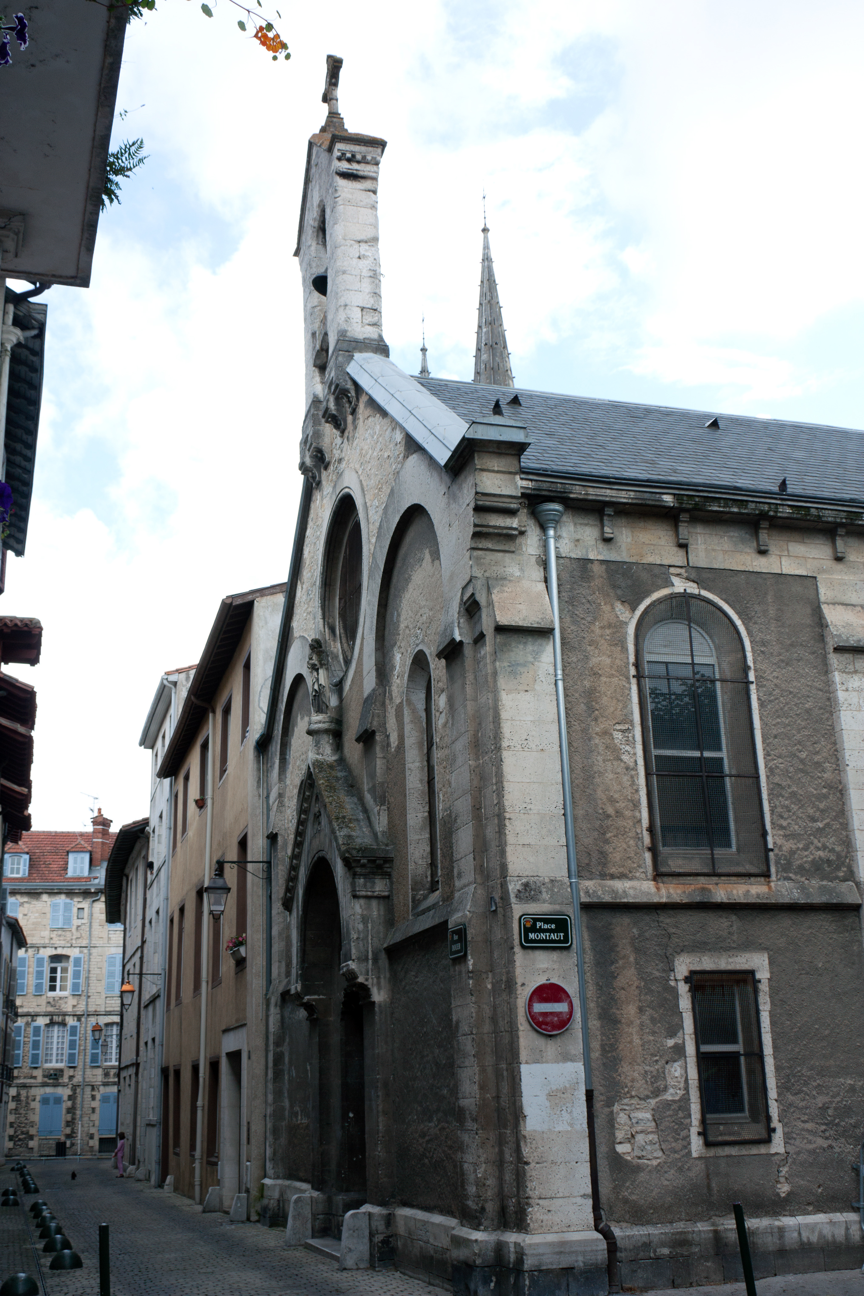 La rue Douer vue de la place Montaut